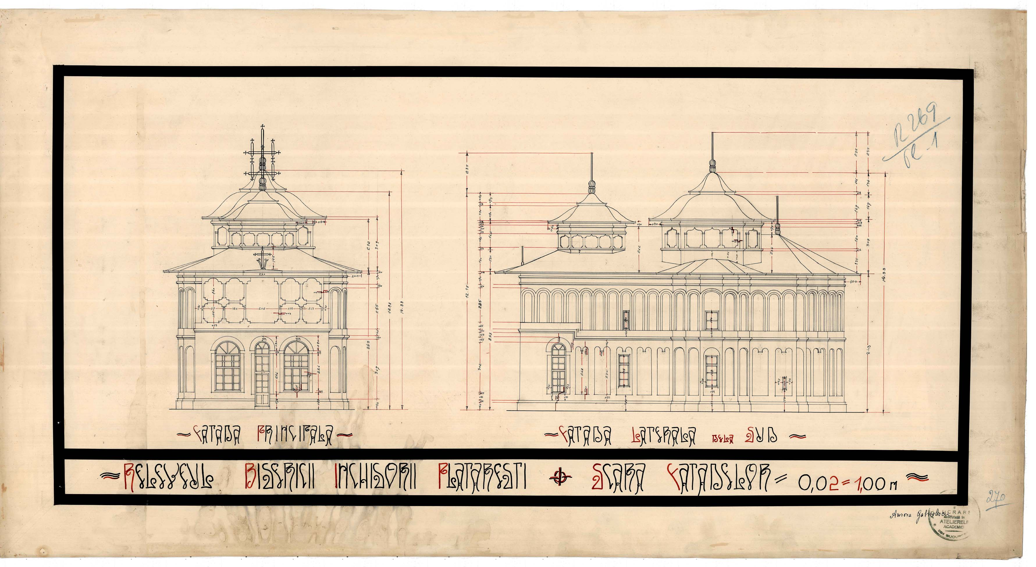 Releveu arhitectonic al Mănăstirii Plătăreşti, realizat în 1936 This work is free and may be used by anyone for any purpose. If you wish to use this content, you do not need to request permission as long as you follow any licensing requirements mentioned on this page.